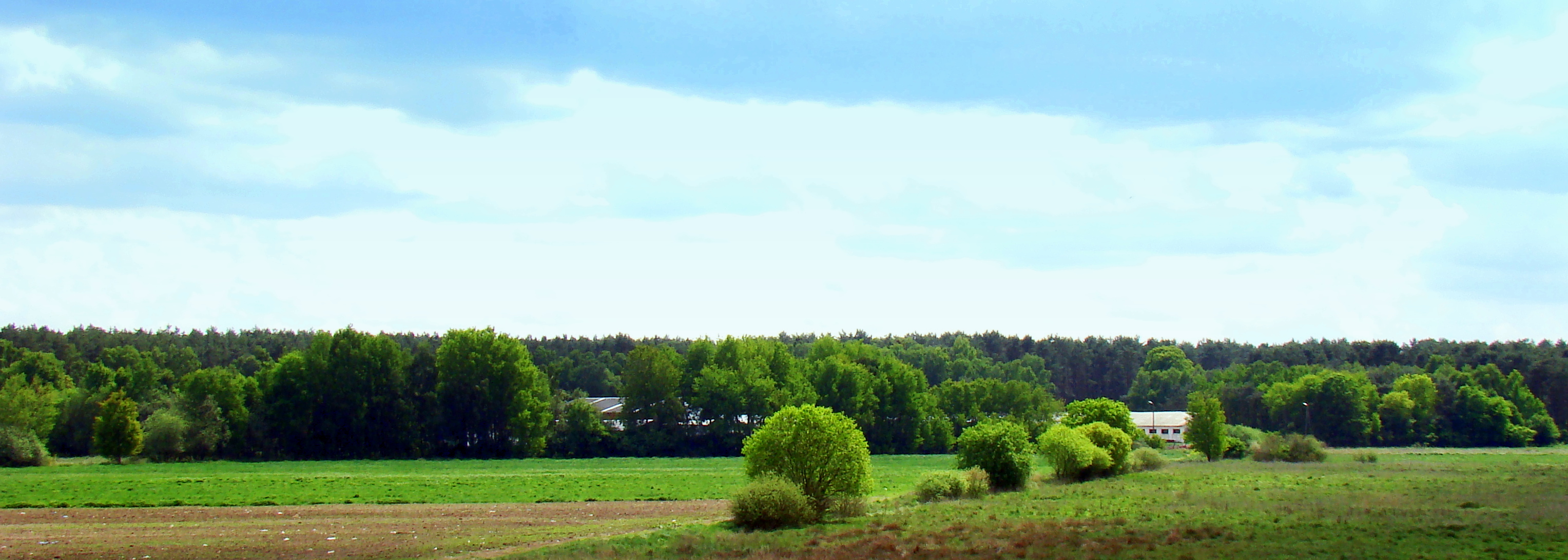 Karpin (budynki inwentarske), Puszcza Wkrzańska, (Powiat policki, Województwo zachodniopomorskie), Polska